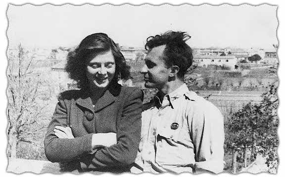 Fotografia della partigiana Walkiria Terradura con il marito Alfonso Thiele